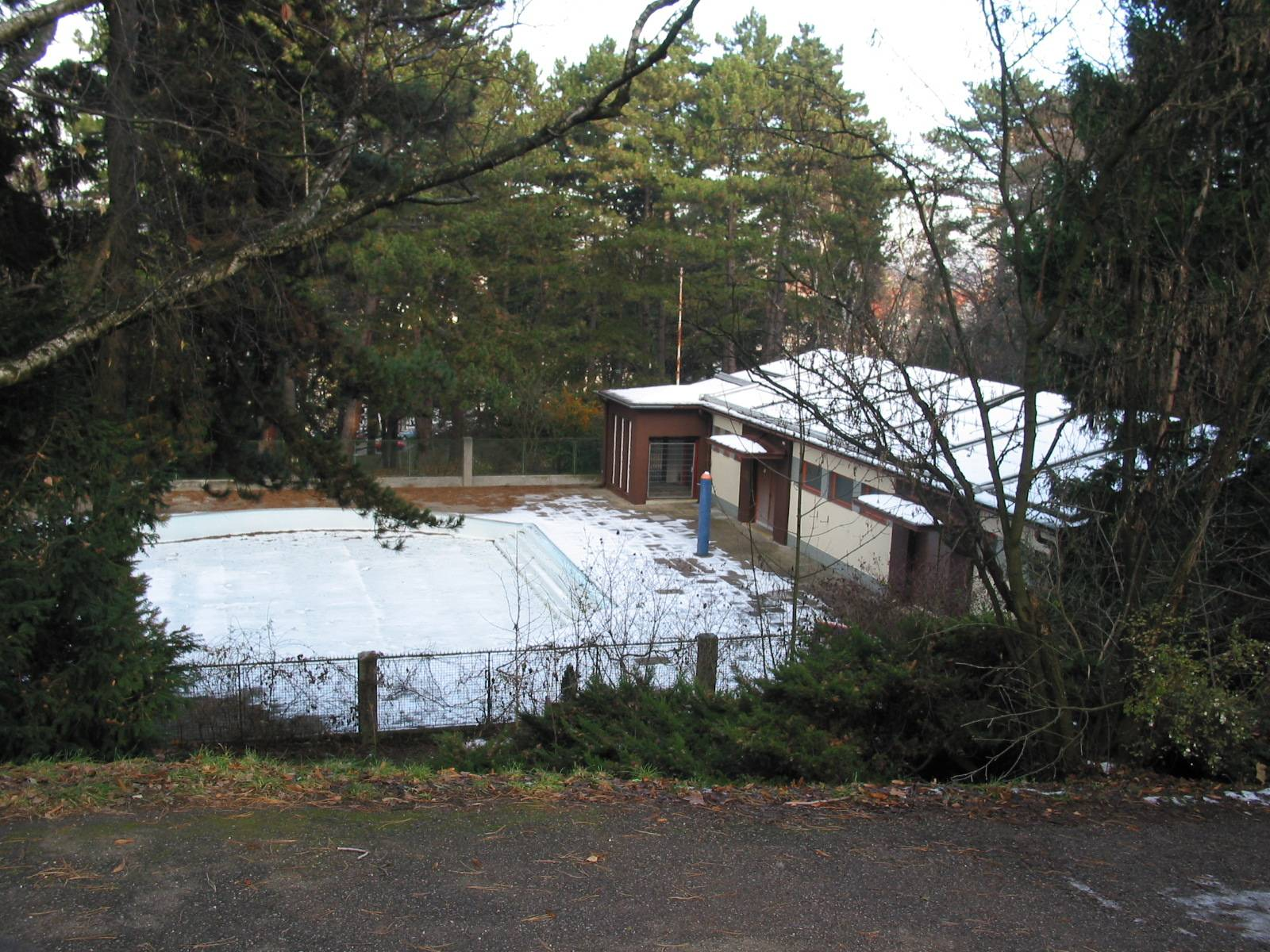 Kinderfreibad, Hugo-Wolf-Park, Vienna XIX, 2005-12-04 selfmade photo